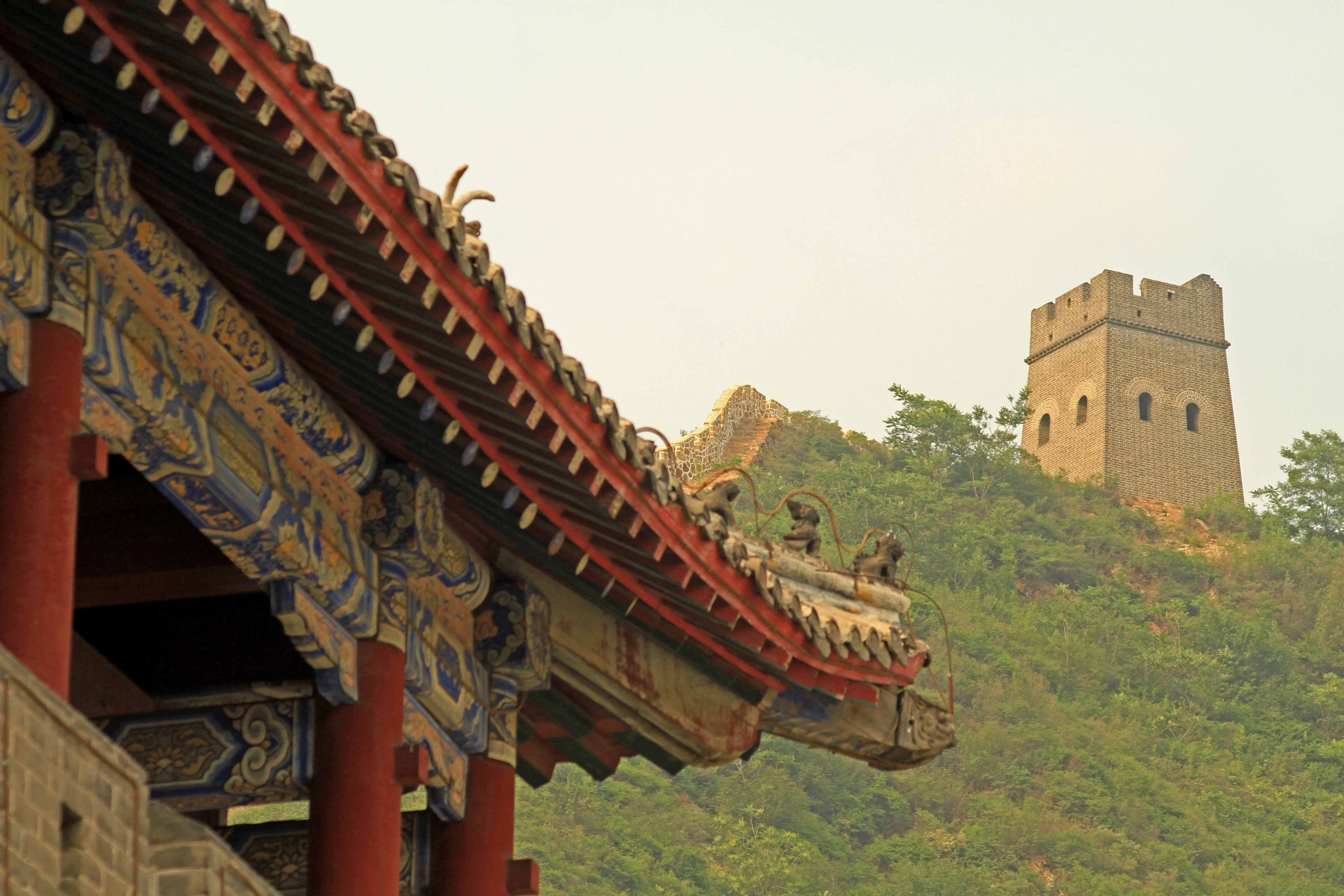 Huangyaguan 08